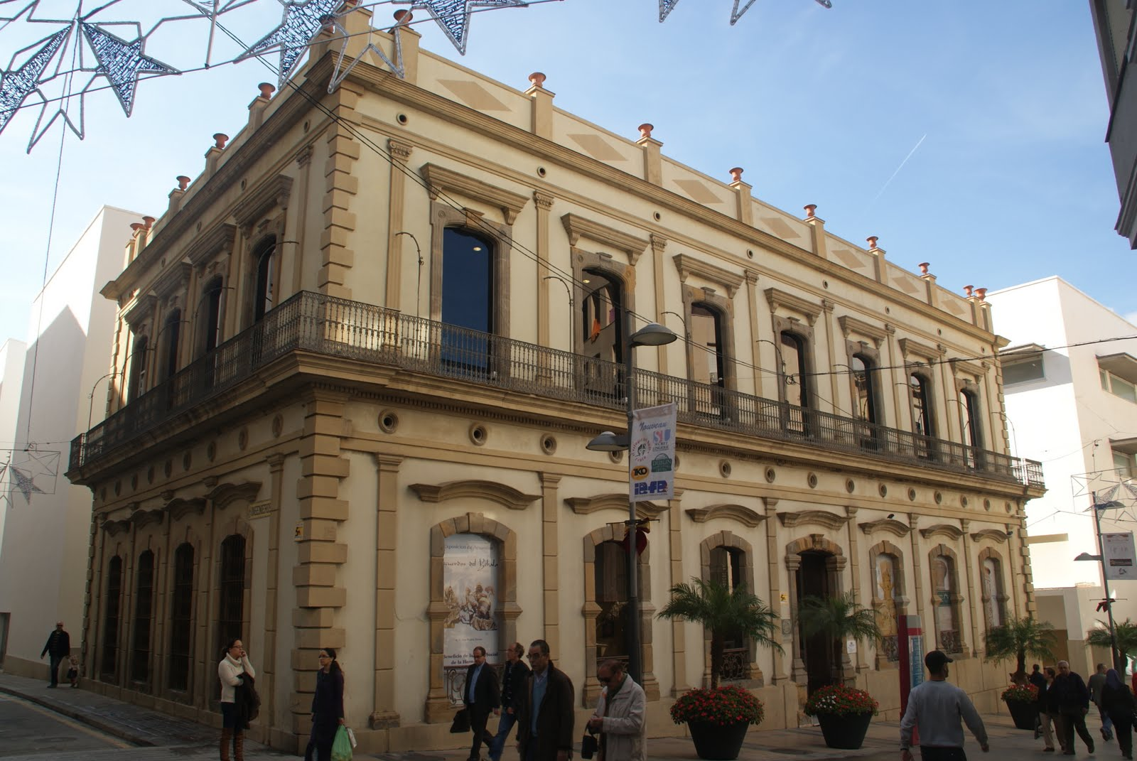 Museo del Revellín, Ceuta.